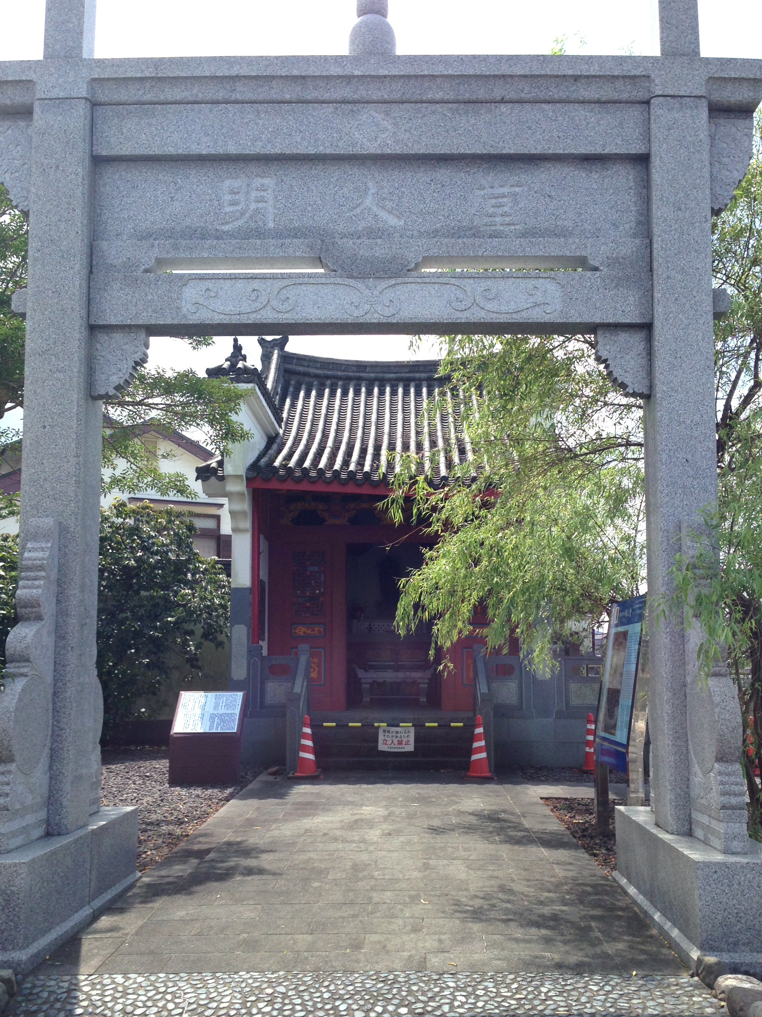 五島市江川町、明人堂（入り口）